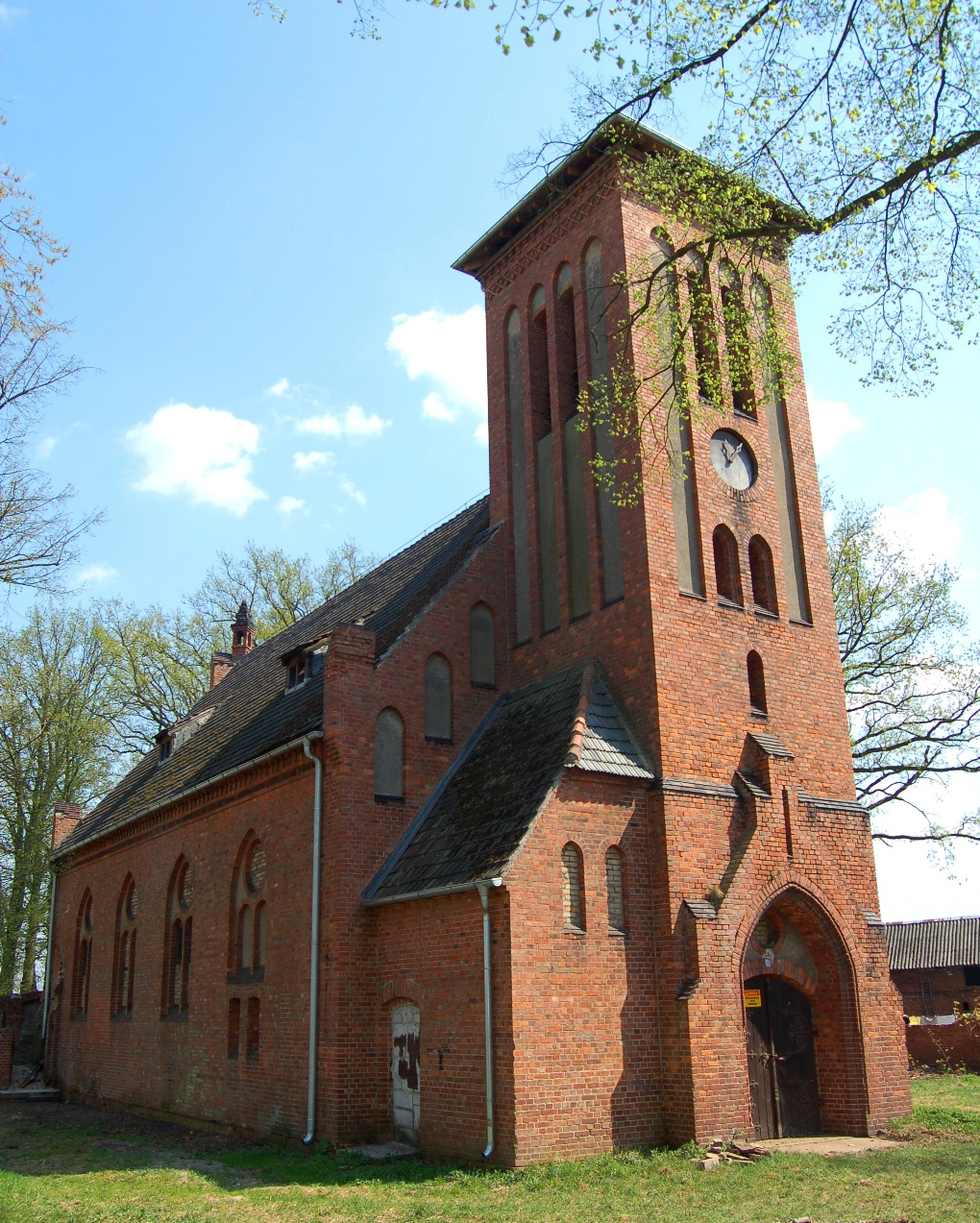 Nieczynny kościół ewangelicki z lat 1896-1898 przy ul. Czarnkowskiej w Ryczywole, Gmina Ryczywół, powiat obornicki